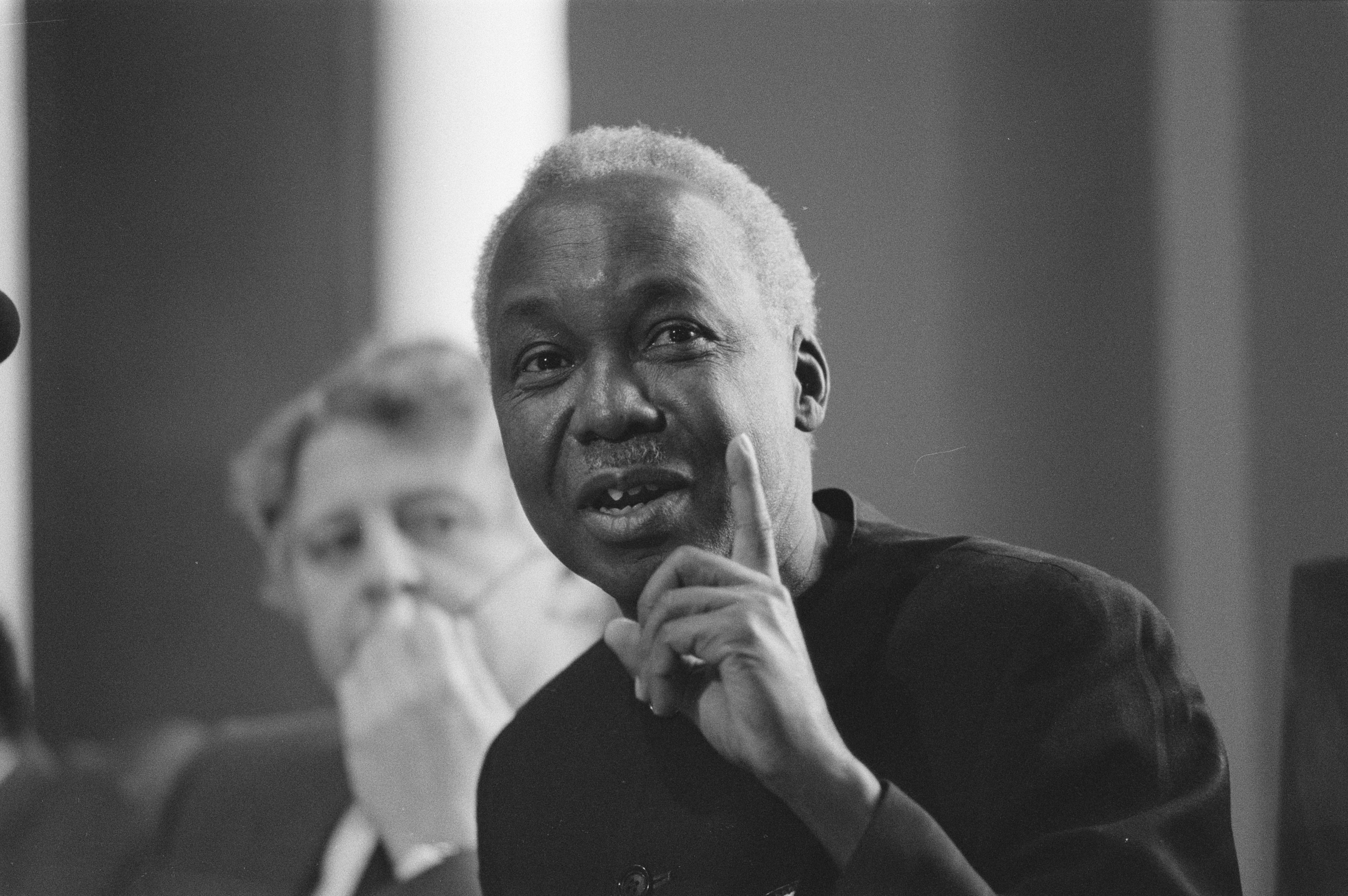 Collectie / Archief : Fotocollectie Anefo Reportage / Serie : [ onbekend ] Beschrijving : Bezoek president Nyerere van Tanzania; president Nyerere spreekt in de Eerste Kamer de Eerste en Tweede Kamerleden toe Datum : 12 maart 1985 Trefwoorden : bezoeken, presidenten Persoonsnaam : Nyerere, Julius Fotograaf : Bogaerts, Rob / Anefo Auteursrechthebbende : Nationaal Archief Materiaalsoort : Negatief (zwart/wit) Nummer archiefinventaris : bekijk toegang 2.24.01.05 Bestanddeelnummer : 933-2627